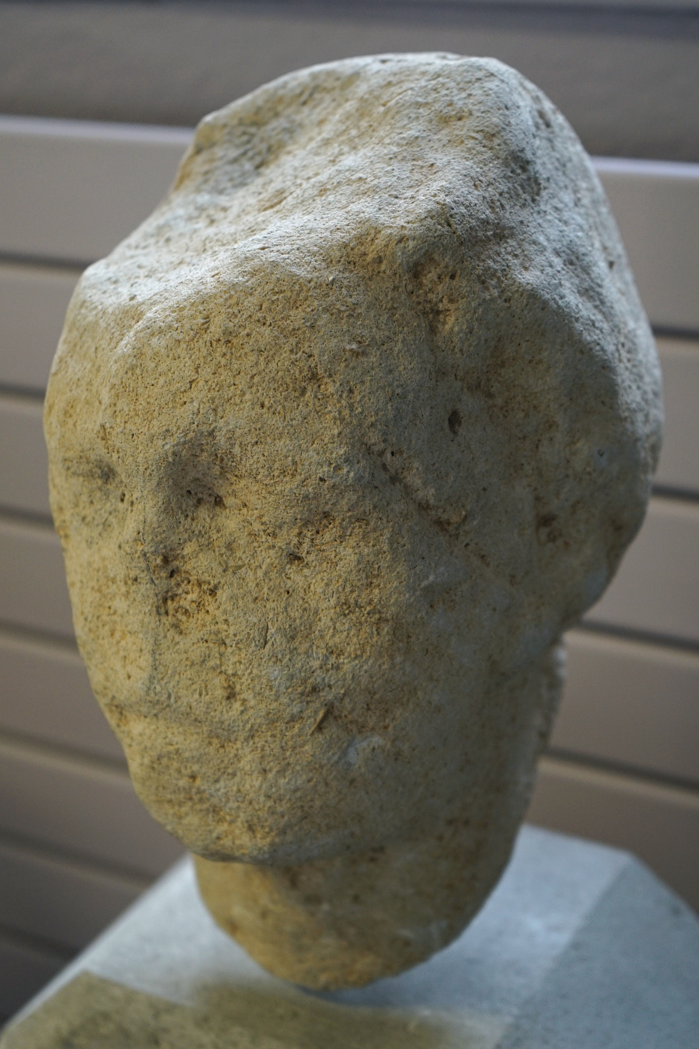 présenté au musée de Toul.